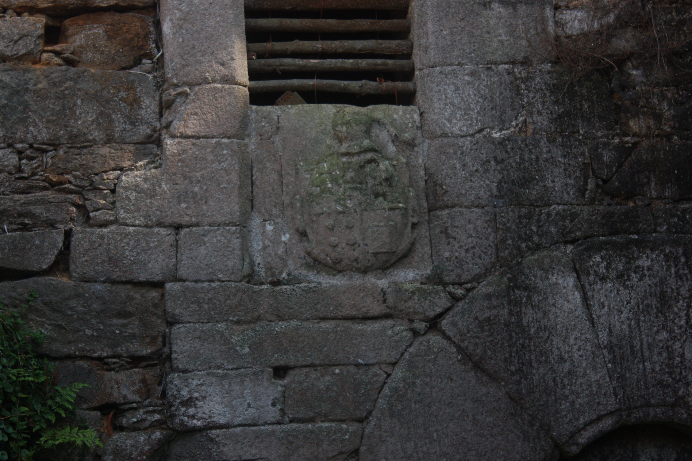 Escudo na Torre da Penela no lugar da Penela (Cabana de Bergantiños)